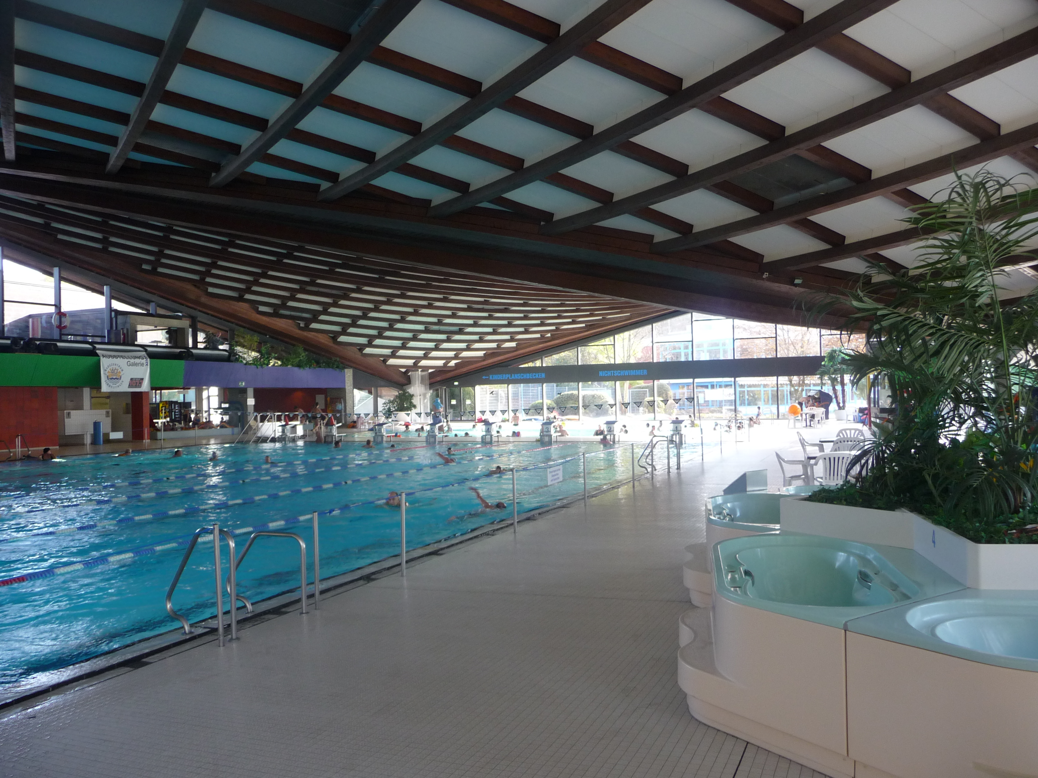 Badezentrum Sindelfingen – Hallenbad Sport- und Nichtschwimmerbecken